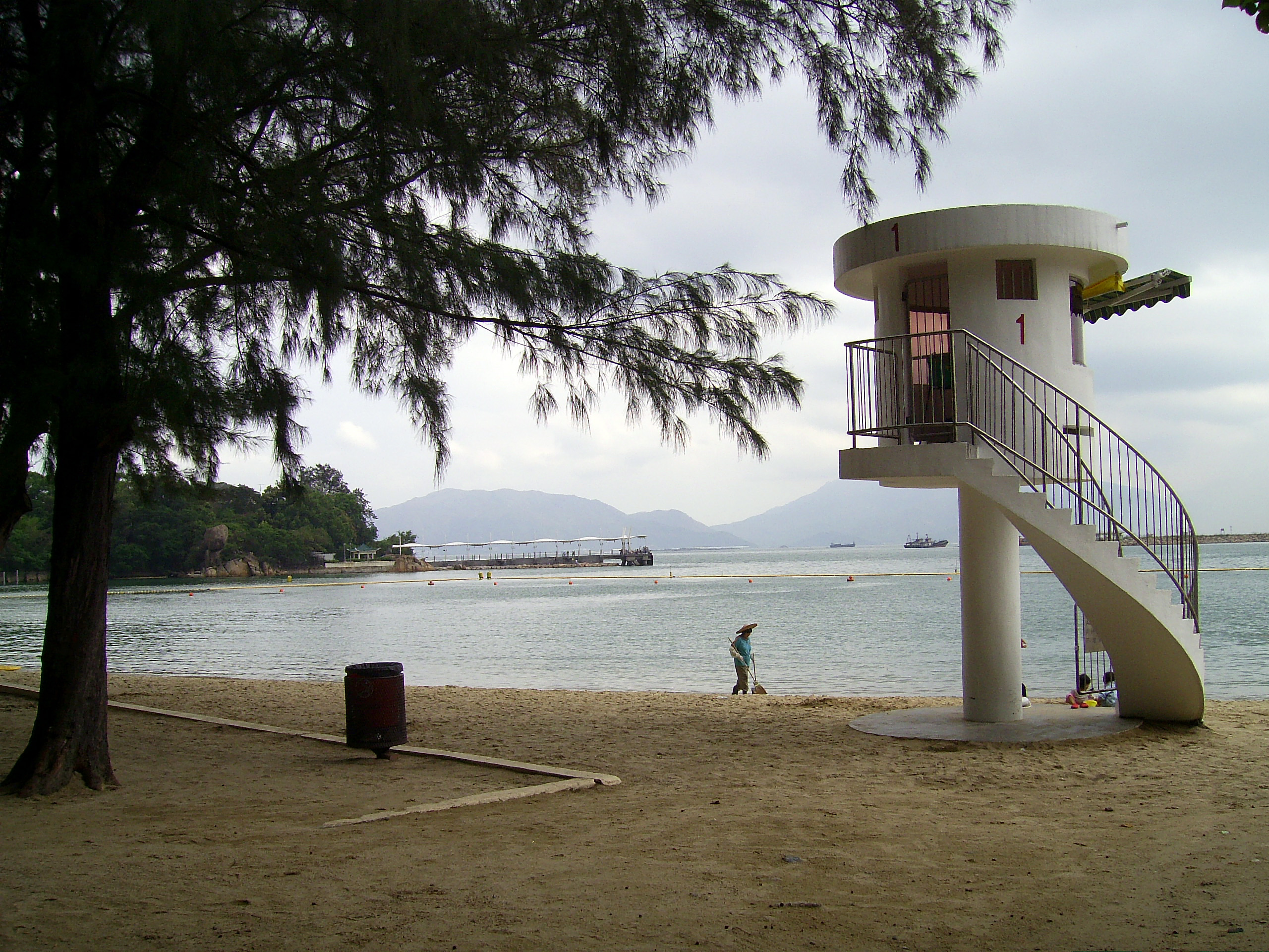 中文（香港）: 青山灣泳灘